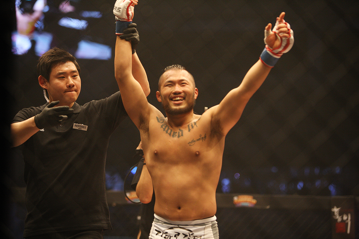 로드 FC 028 영건스 대회에서 승리한 주먹이 운다 출신 김형수